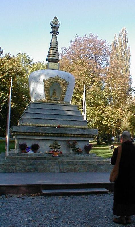 Stupa in Graz Photograph by Gakuro